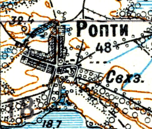 Топографическая карта Ленинградской области, квадрат Vc-29 (Батецкая), деревня Ропти